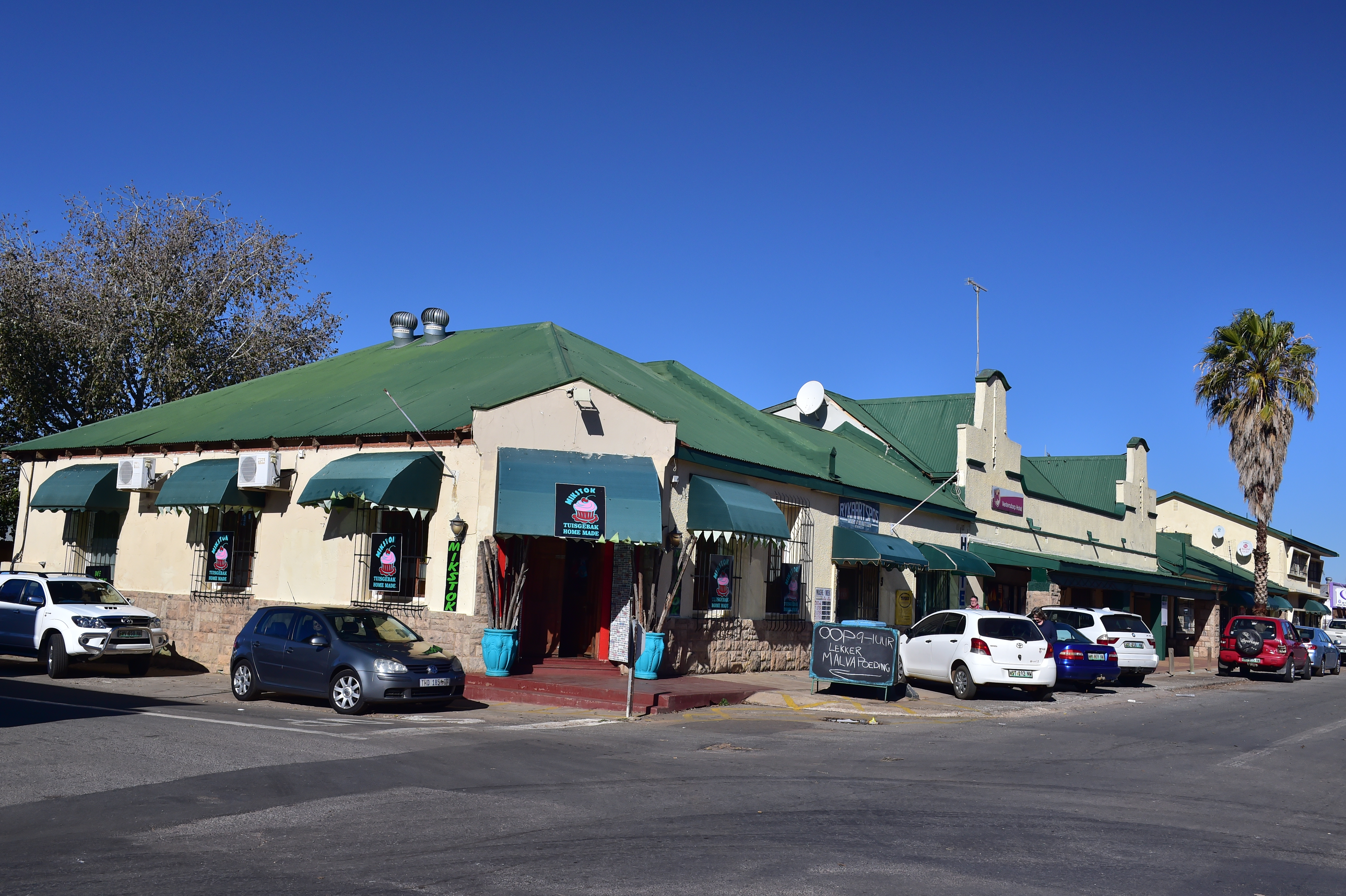 Vue du North West en Afrique du Sud.